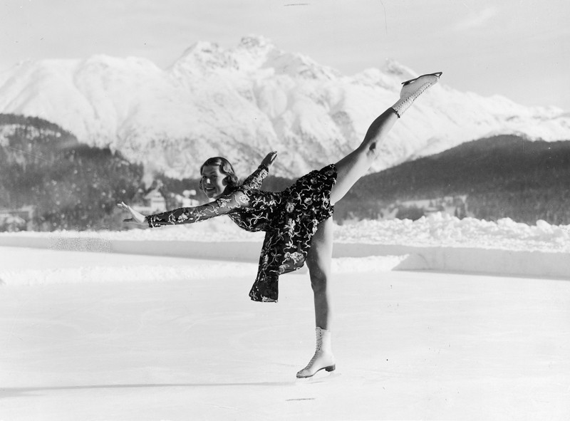 Tytuł: Międzynarodowe Zawody w Łyżwiarstwie Figurowym w Davos, 1938/01. Brytyjska mistrzyni świata w jeździe figurowej, Cecilia Colledge, podczas występów.